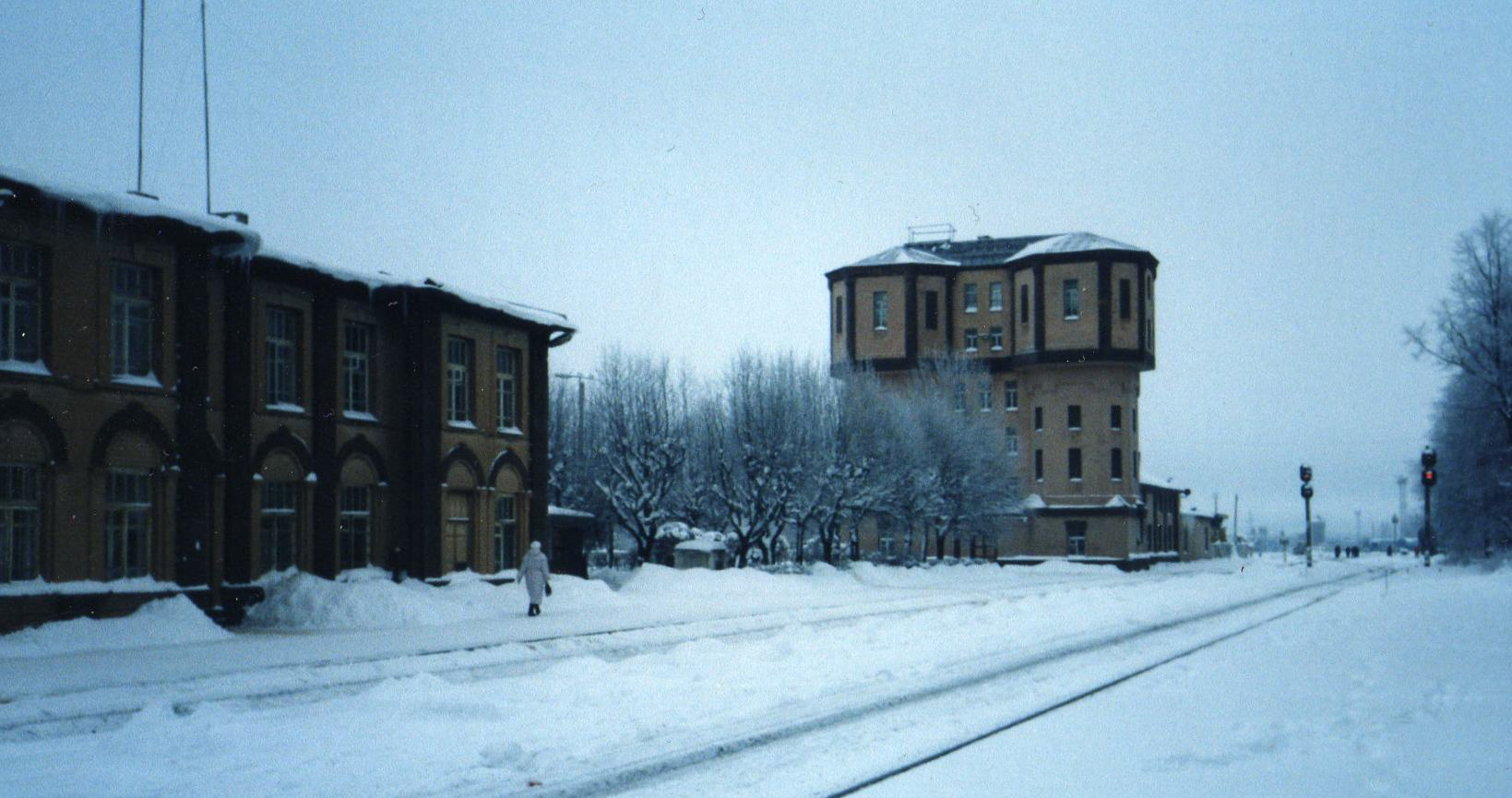 Вокзал Тапа (двухэтажный корпус) и водонапорная башня, 1997 год